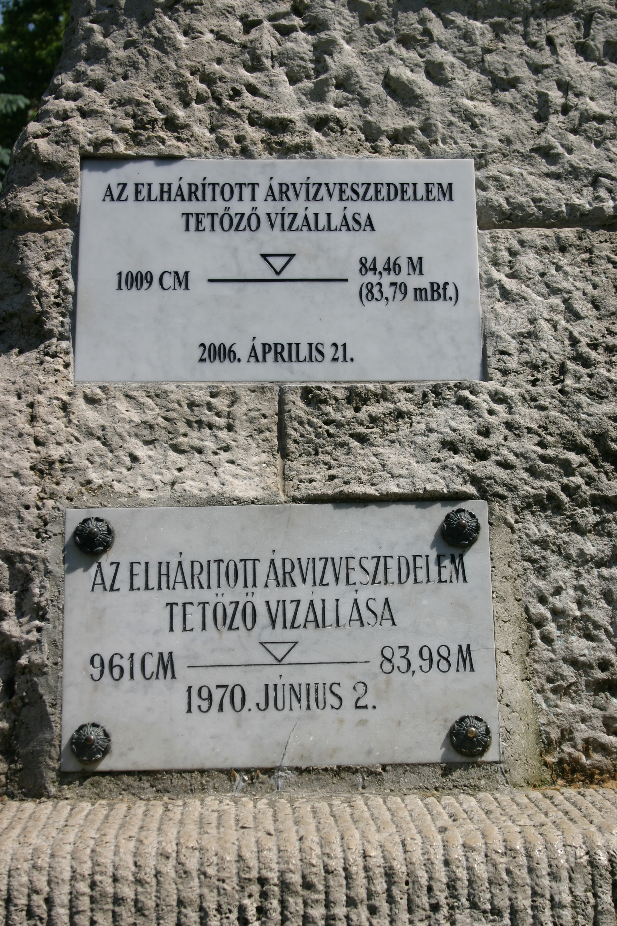 Szeged: Árvízszintvonalak kőbe vésve